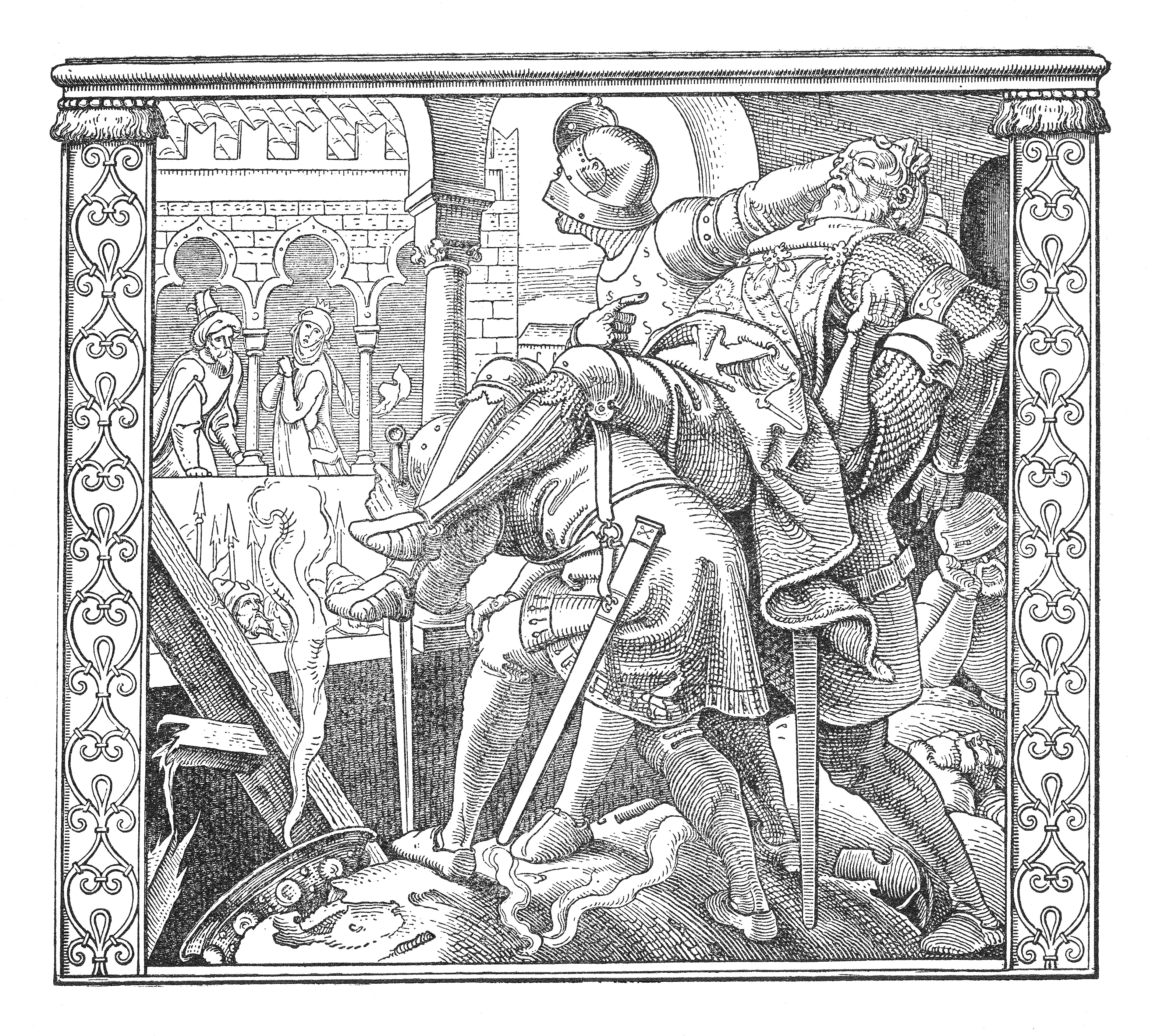 Wie Kriemhilden der Leichnam Rüdigers gezeigt wird. (Voker von Alzey zeigt Kriemhild den Leichnam Rüdigers von Bechelaren.) Zeichnung zur 37. Aventure, geschnitten von G. Metzger.